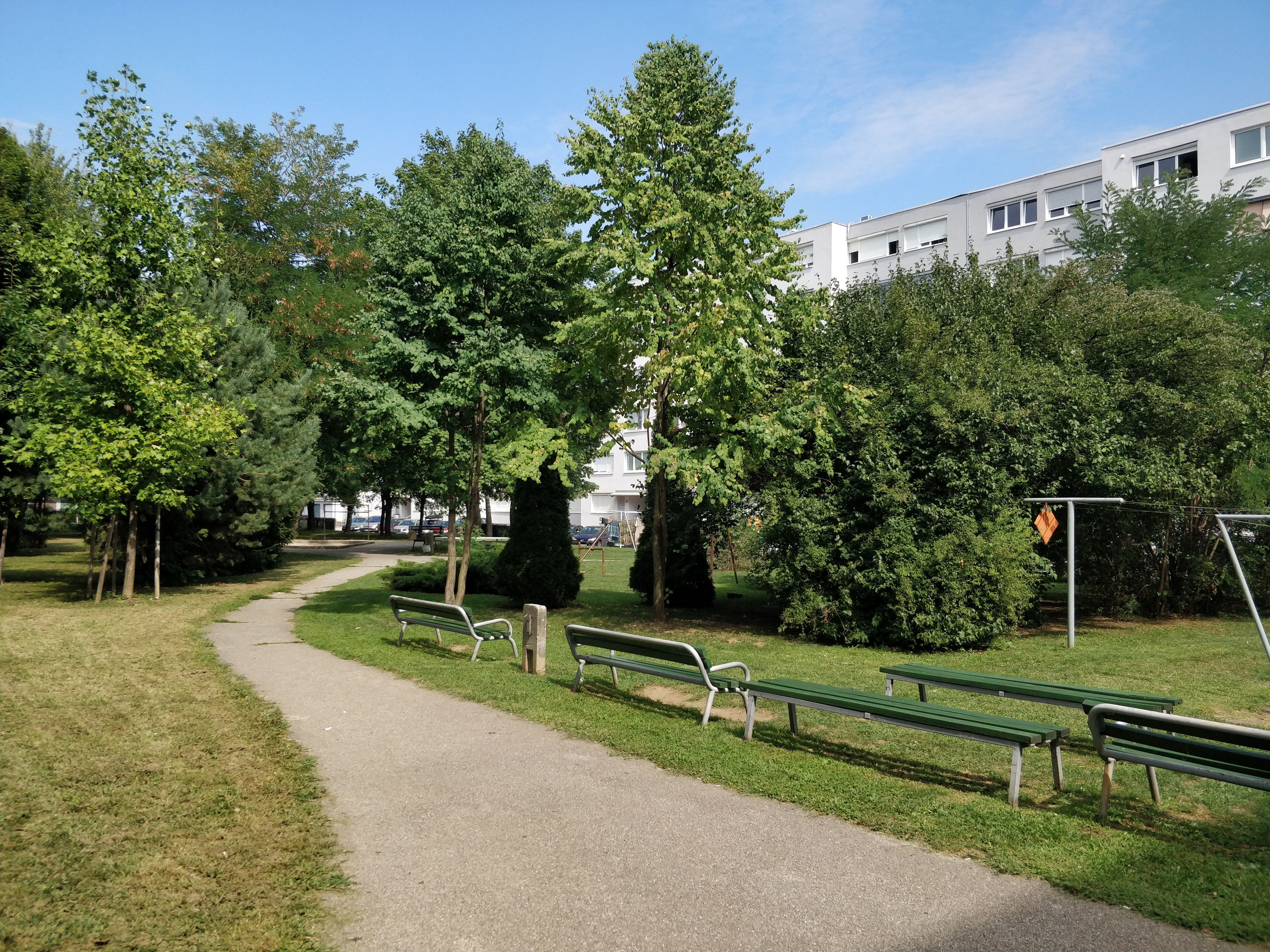 Maribor, Jugomont, park, Tabor